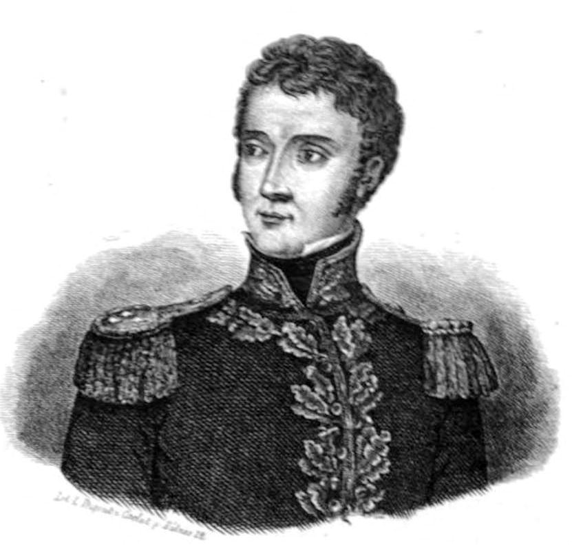 Juan José Carrera Verdugo (Santiago, Capitanía General de Chile; 26 de junio de 1782-Mendoza, Argentina; 8 de abril de 1818), por el litógrafo M. Digout. Aparecido en el libro "El ostracismo de los Carreras" de Benjamín Vicuña Mackenna; Imprenta El Ferrocarril, 1857, Santiago de Chile. Sobre la ilustración se aclara en el texto: "Ha sido tomado por el mismo perfil de su hermana, con quien tenía gran semenjanza, introduciendo, sin embargo, los cambios convenientes, según las indicaciones fidedignas que se han hecho".